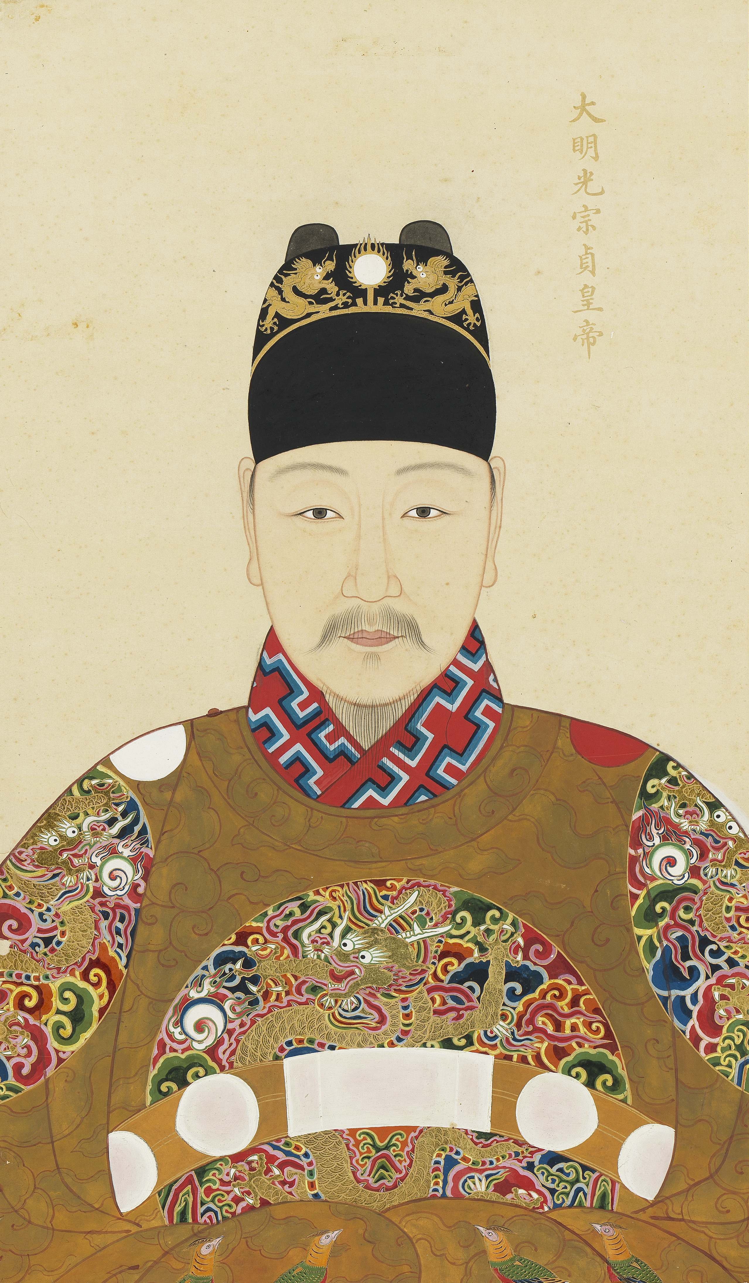 中文（中国大陆）: 作者已经去世超过200年，作品已经进入公有领域。